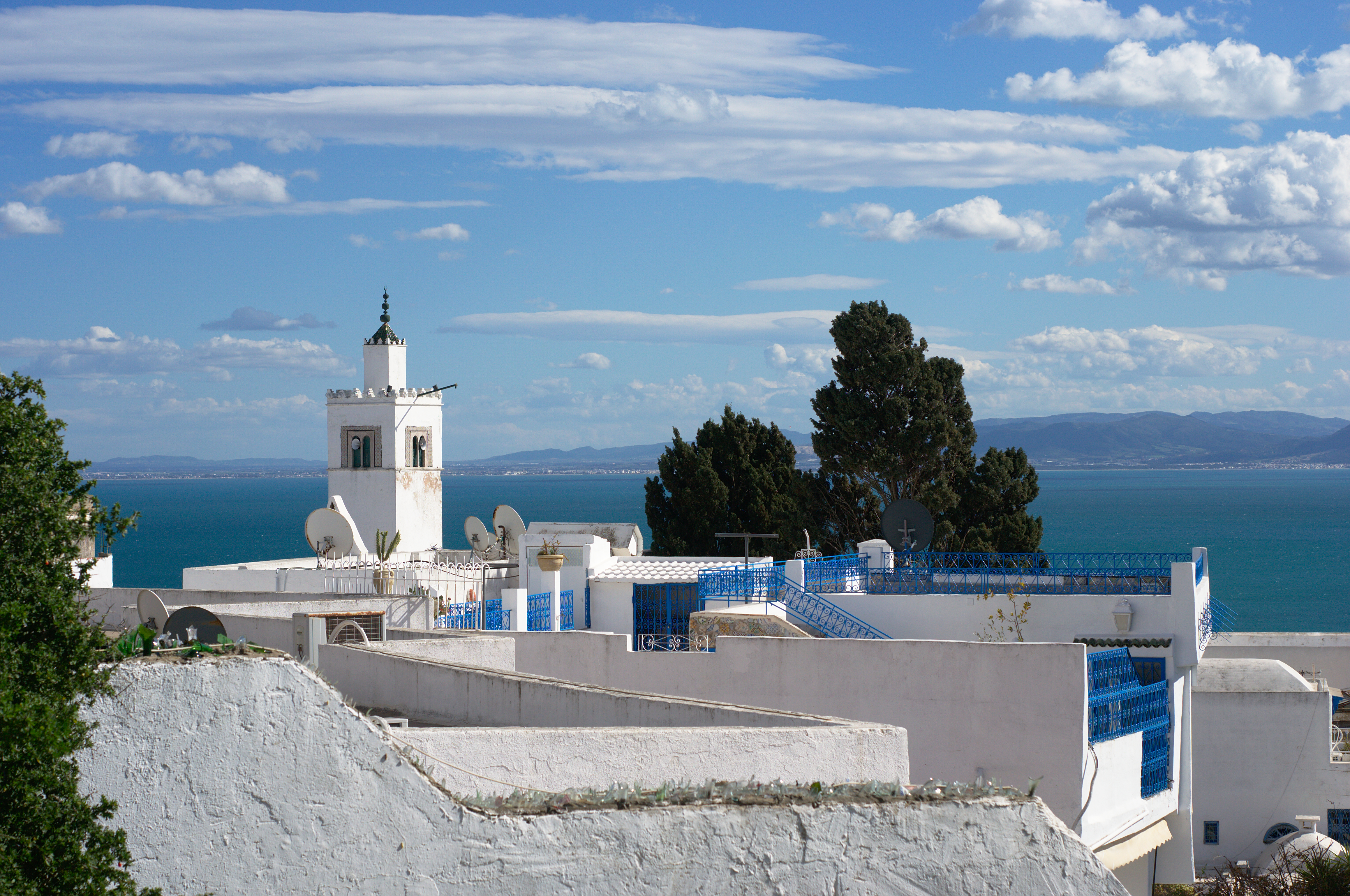 Sidi Bou Said, Tunisie CC BY SA-User:Dyolf77